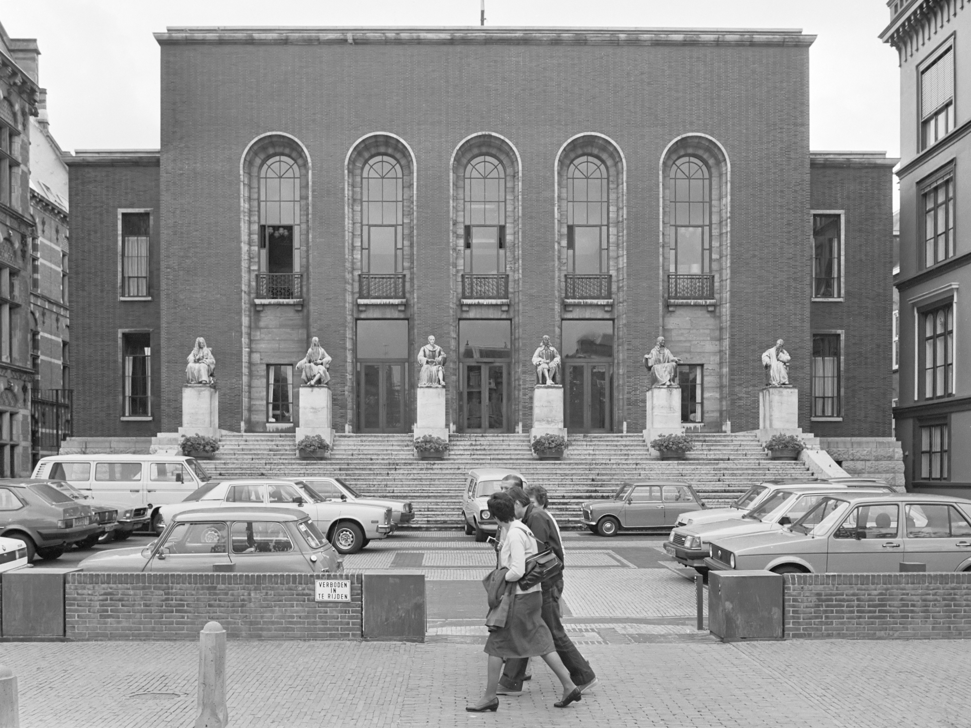 Exterieur gebouw van de Hoge Raad in Den Haag dat waarschijnlijk gesloopt wordt 16 augustus 1982